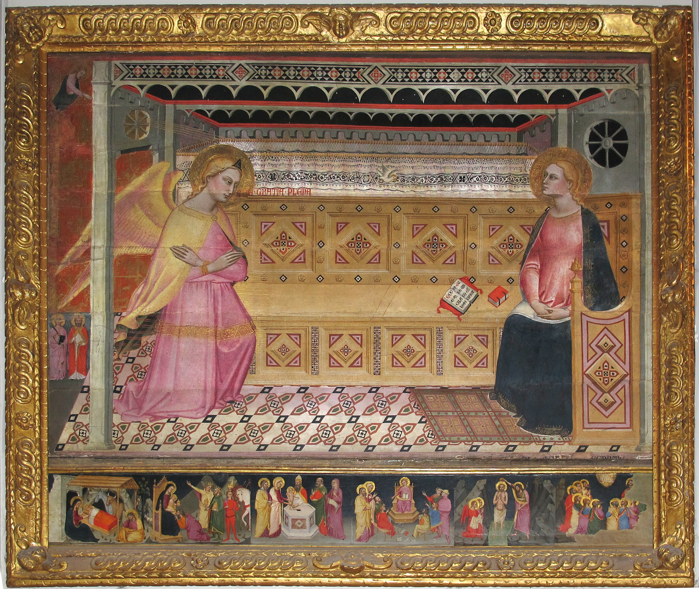 in alto, il Padre Eterno e, in basso, in piedi San Nicola da Bari e Santa Caterina d’Alessandria. Sulle pagine del libro più grande, aperto, la scritta "Ecce ancilla Domini, Ecce Virgo concipiet"; sulla bocca dell’Arcangelo le parole "Ave grazia plena". In basso a destra della tavola ci sono i resti di una iscrizione a caratteri gotici non ben leggibile. La tavola ha un’abbondanza decorativa e un gusto per i dettagli che creano la colorata e fantasiosa ambientazione. La tavola insieme alla predella sottostante, fino al 1741 fu sull’altare maggiore della chiesa. Inserita in una cornice manieristica di legno intagliato dalla mano di Lodovico Casini e dorata da fra Raffaello Chiari. Si trovava in restauro presso la SBAS di Firenze dal 1959 ed è stata ricollocata al suo posto il 20 dicembre 2002. La predella: Storie di Cristo.